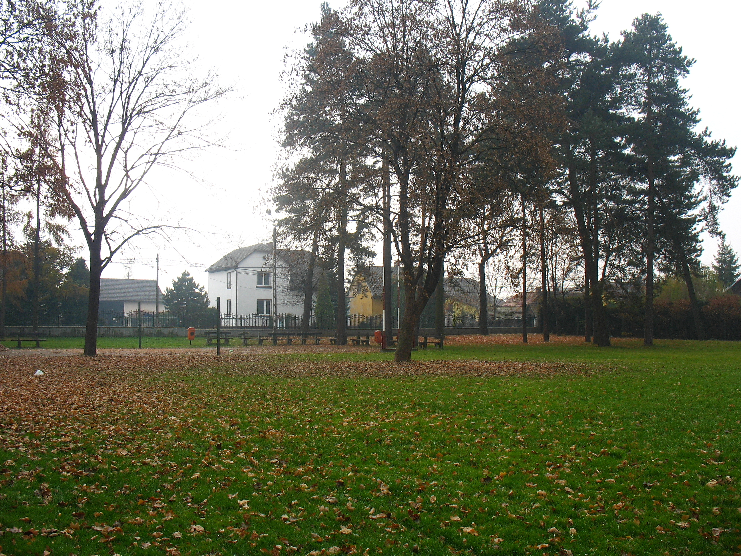 Park przy Dworku w Nowej Wsi